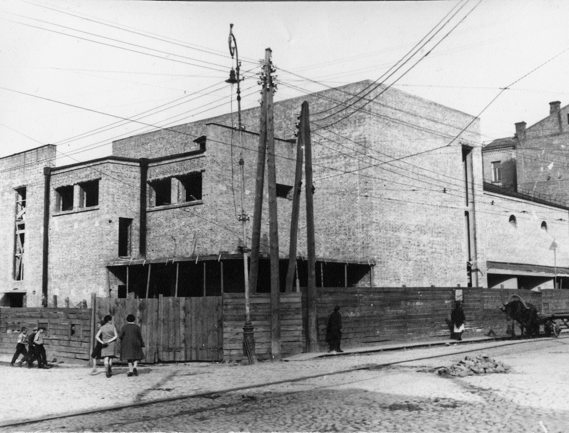 Кінотеатр "Жовтень" до відкриття, 1929 р.